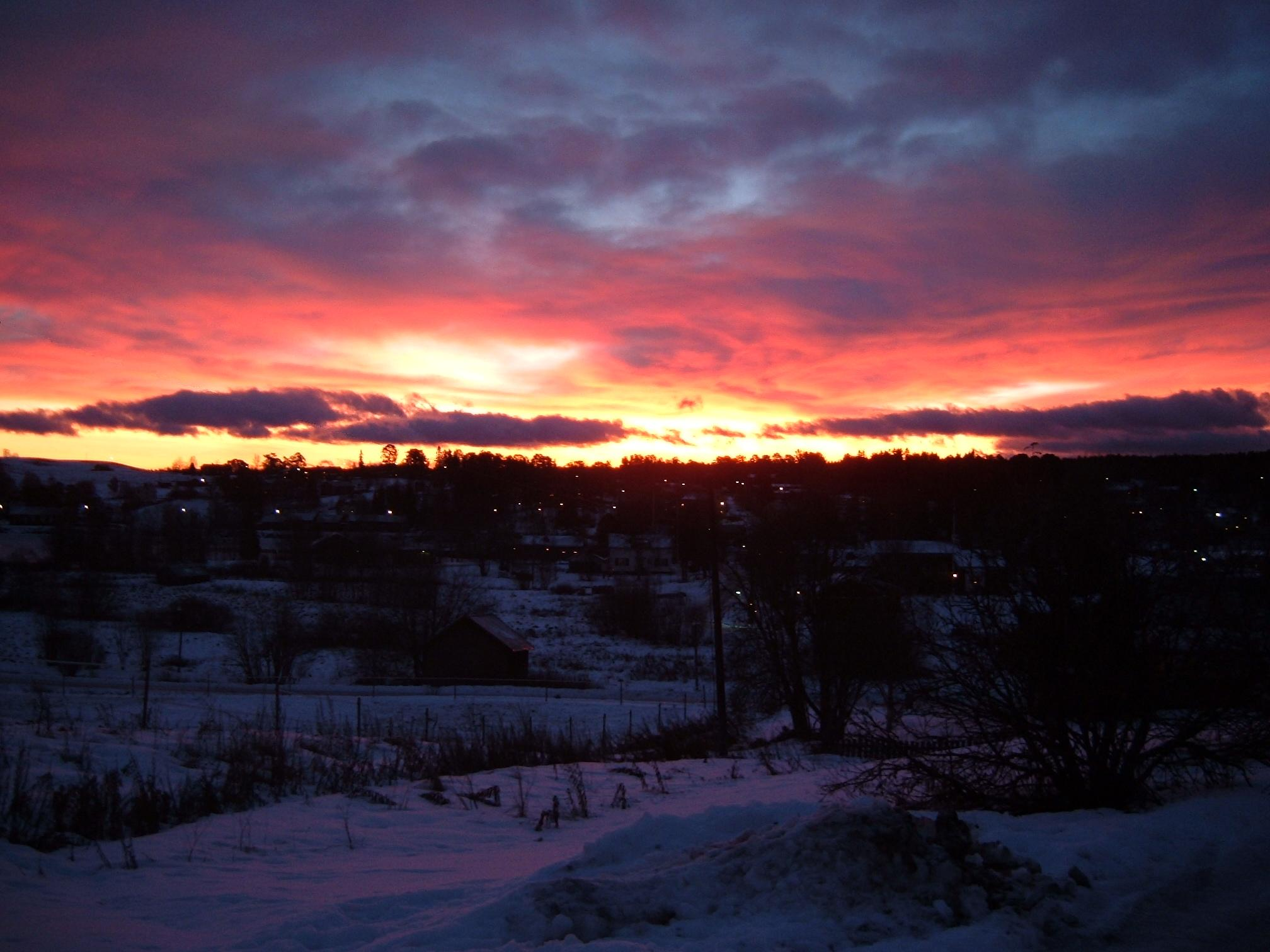 Morgonvy över Nälden, Jämtland